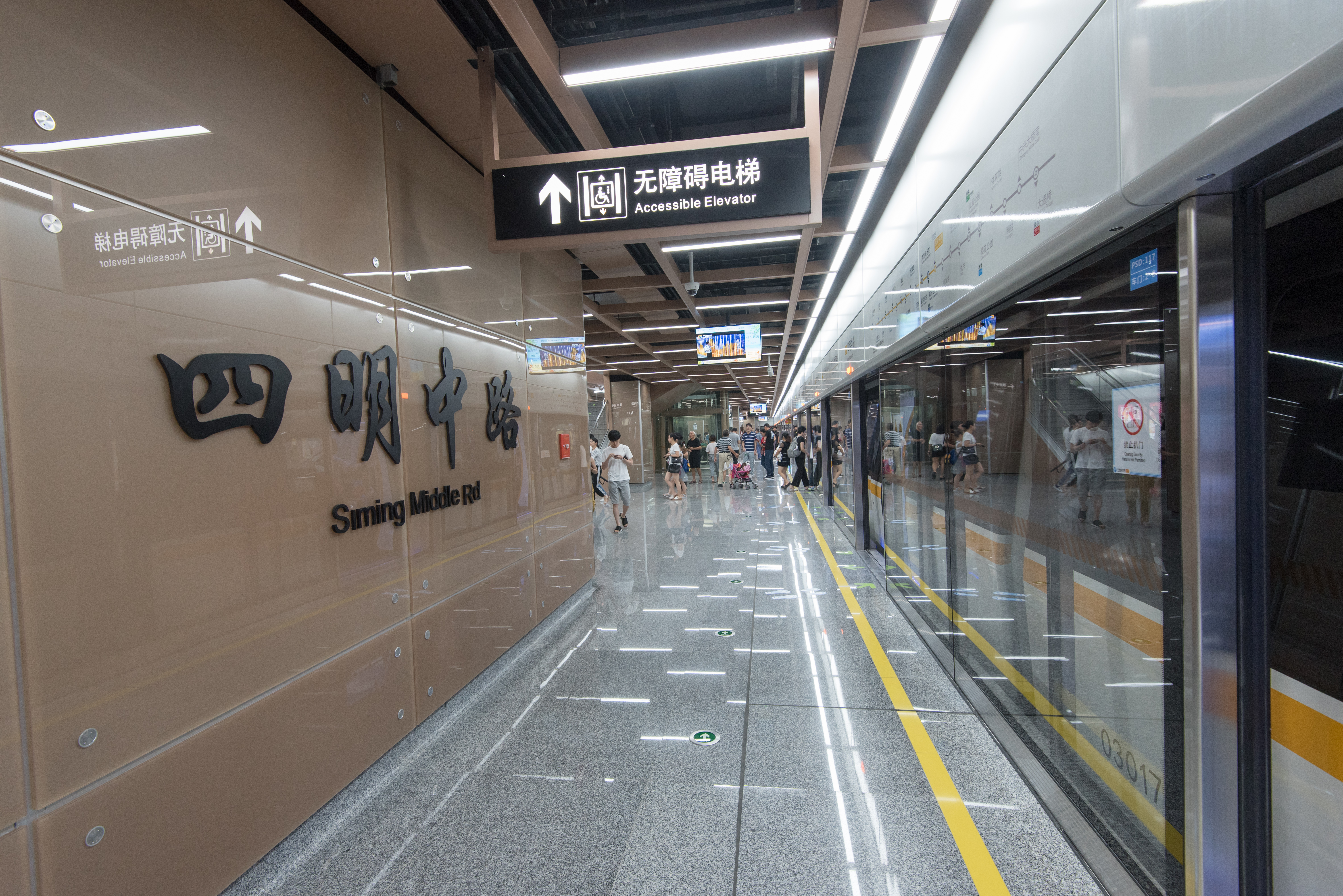 宁波地铁四明中路站